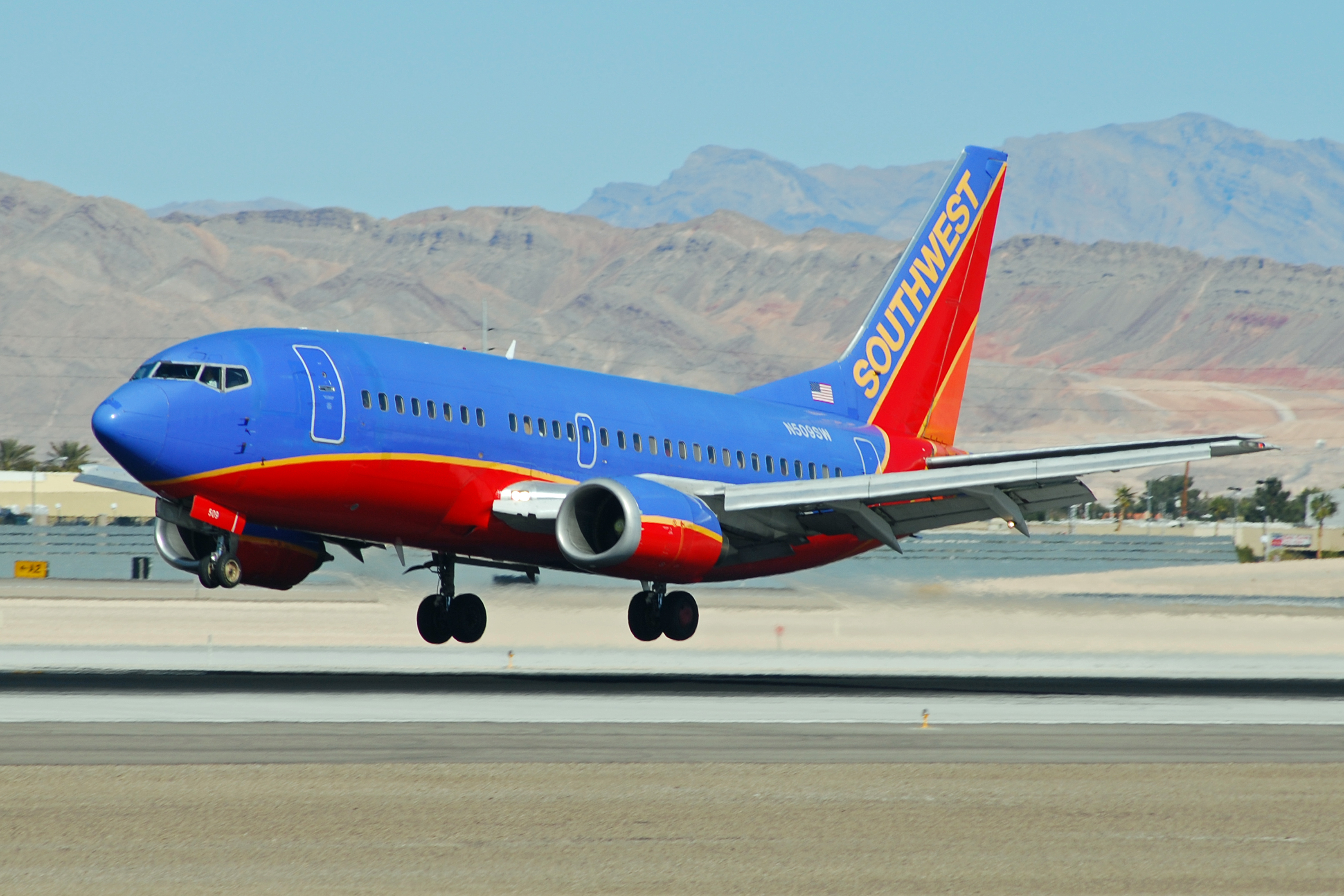 N509SW